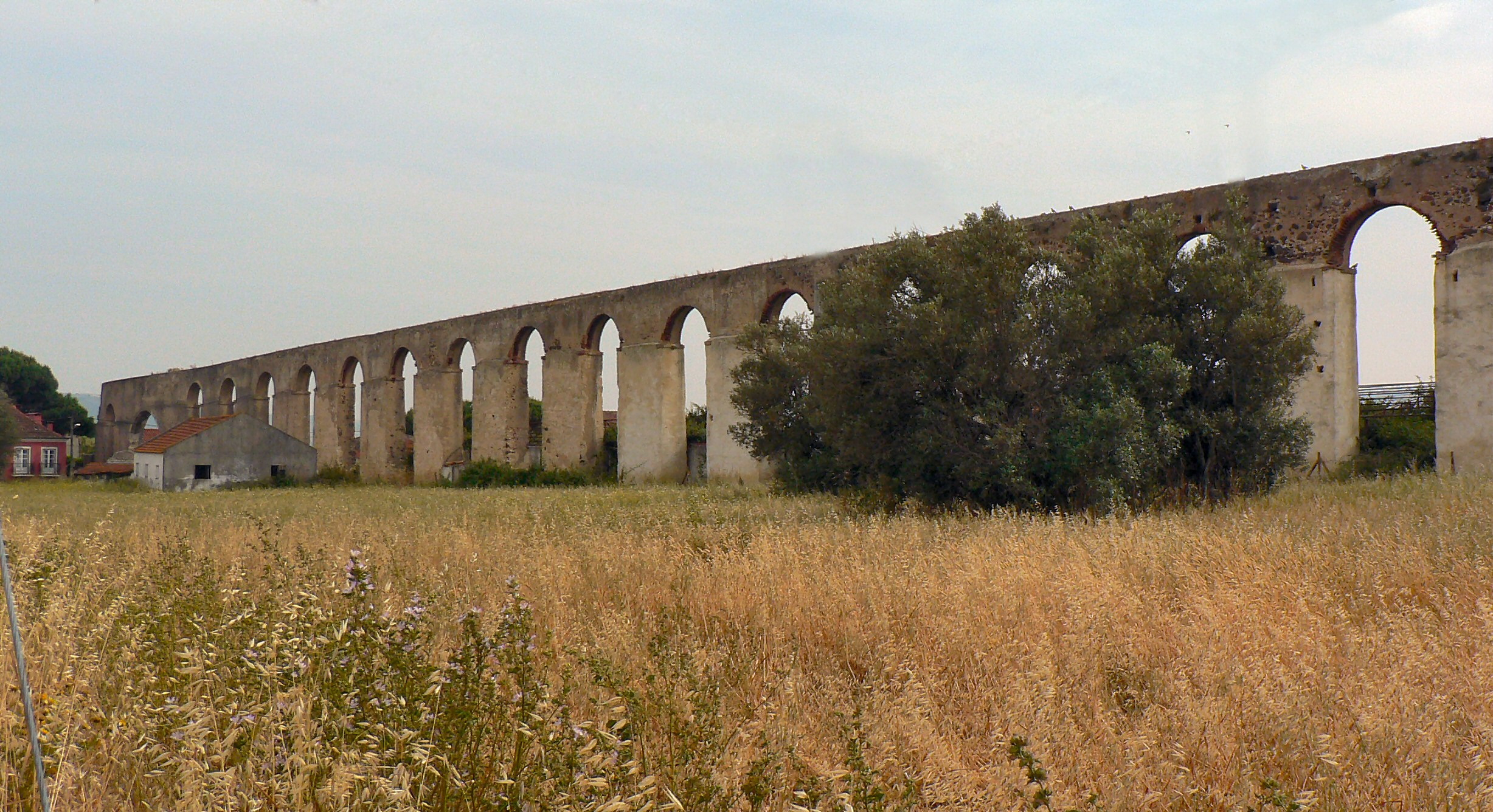 Aqueduto de Santo Antão do Tojal